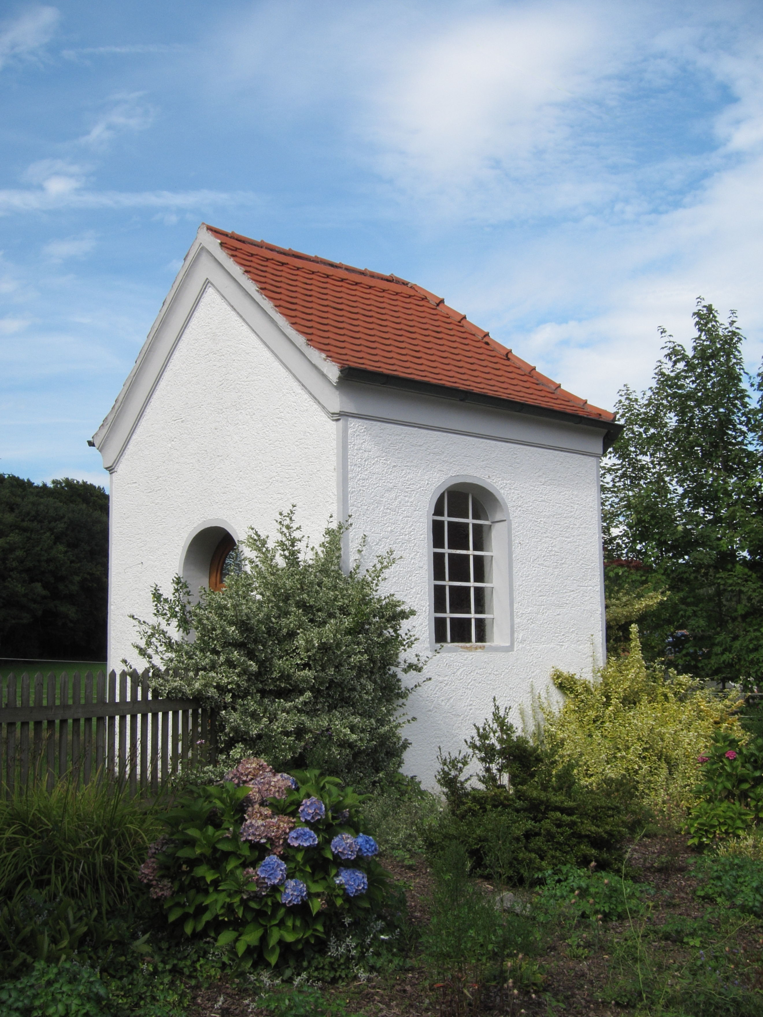 Oberbierbach; Feldkapelle mit Traufgesims, erbaut 1912; mit Ausstattung.